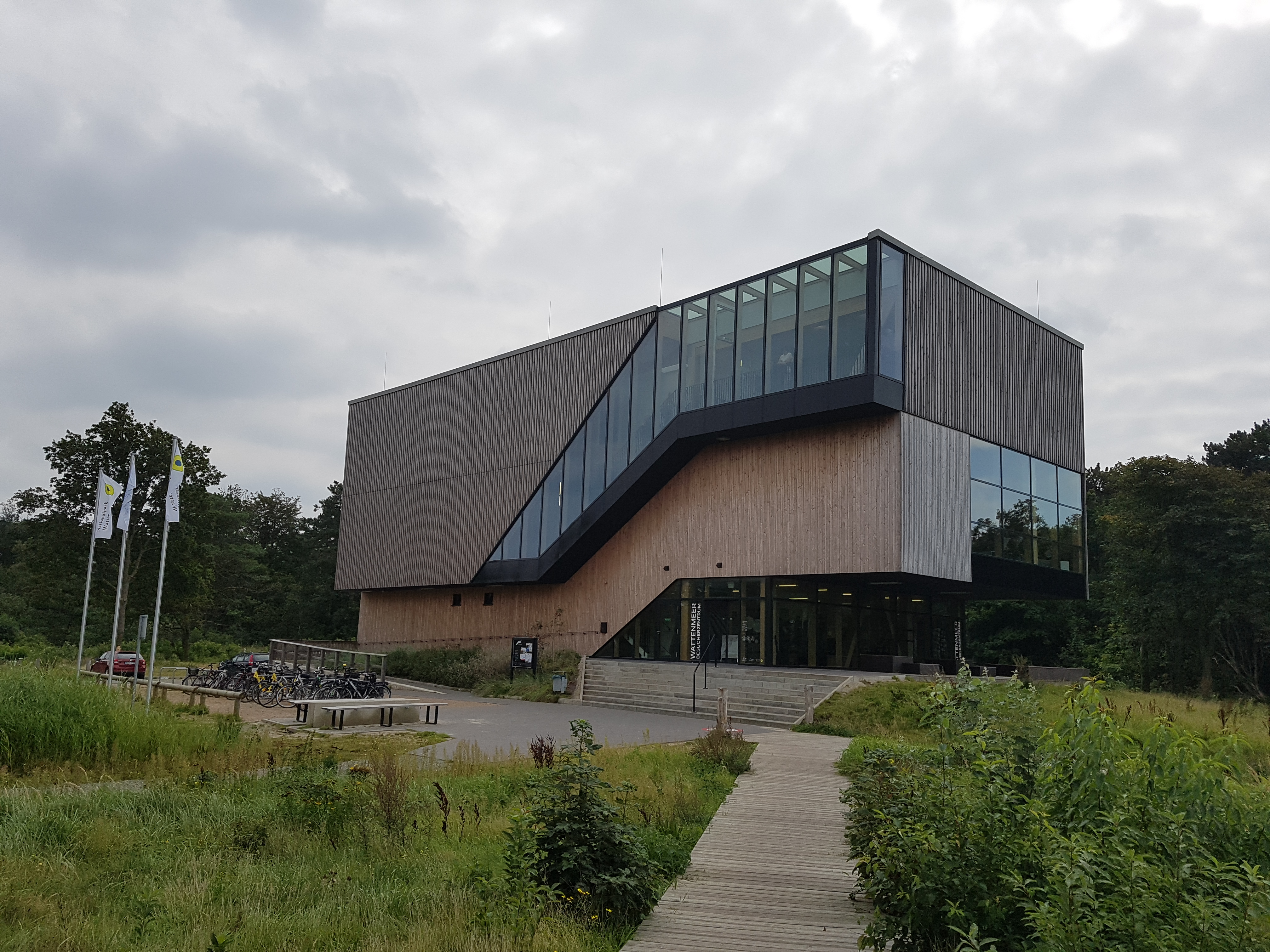 WattBZ (Wattensee-Besökerzentrum) in’n Cuxhobener Stadtdeel Sahlenborg